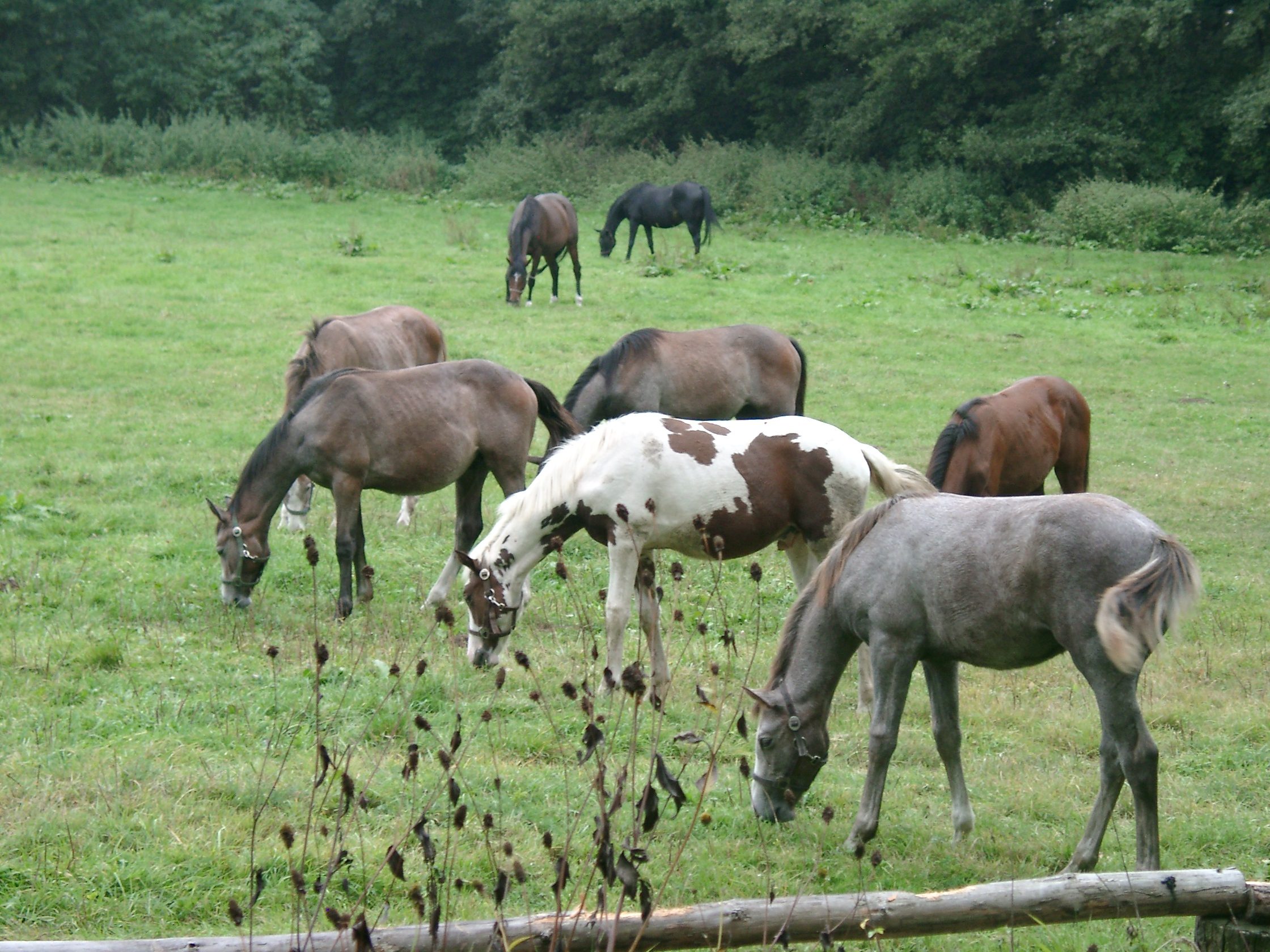 Konie w Jaroszówce koło Chojnowa (Polska) Horses in Jaroszówka near Chojnów, Poland.